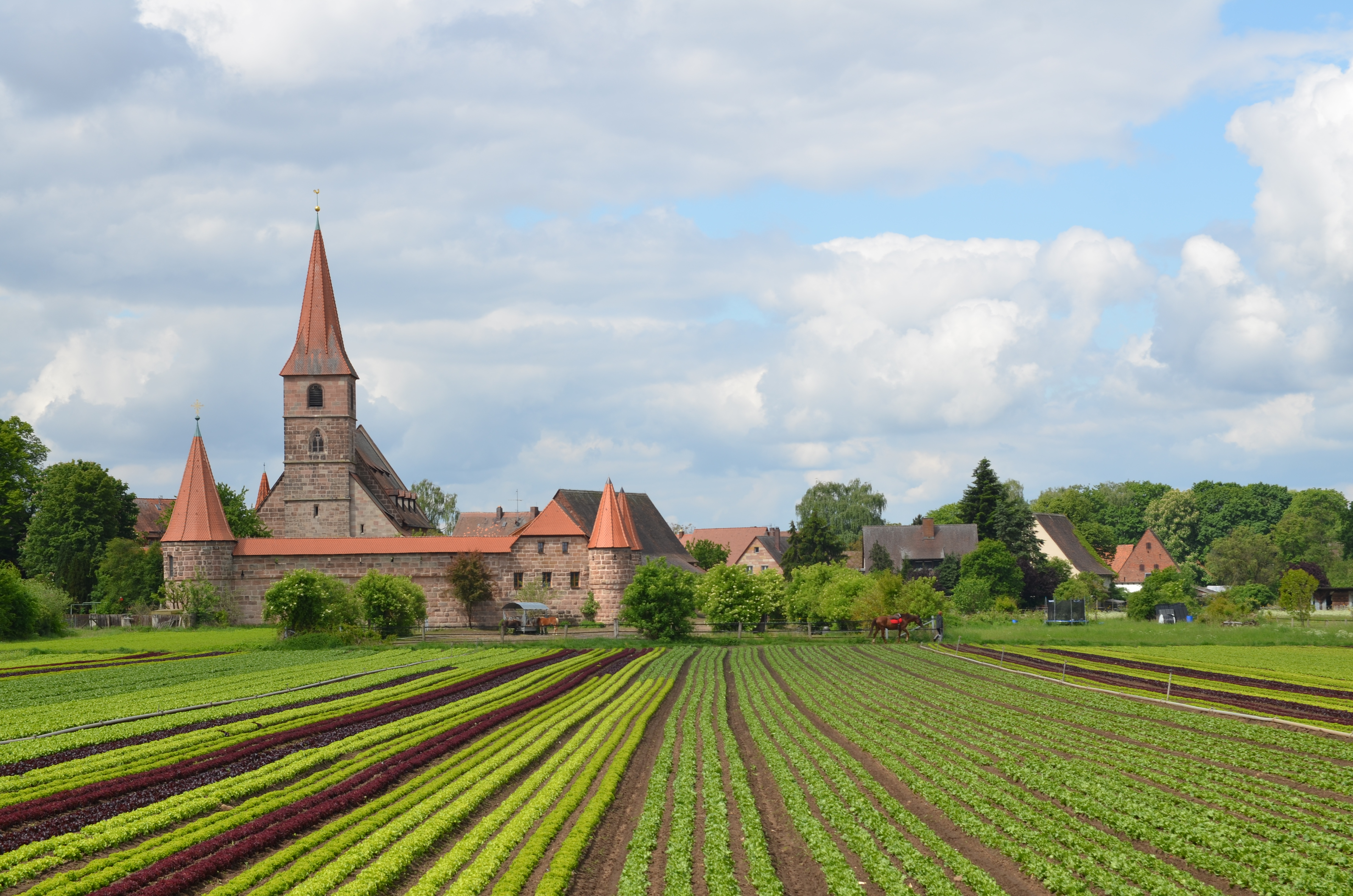 Wehrkirche Kraftshof